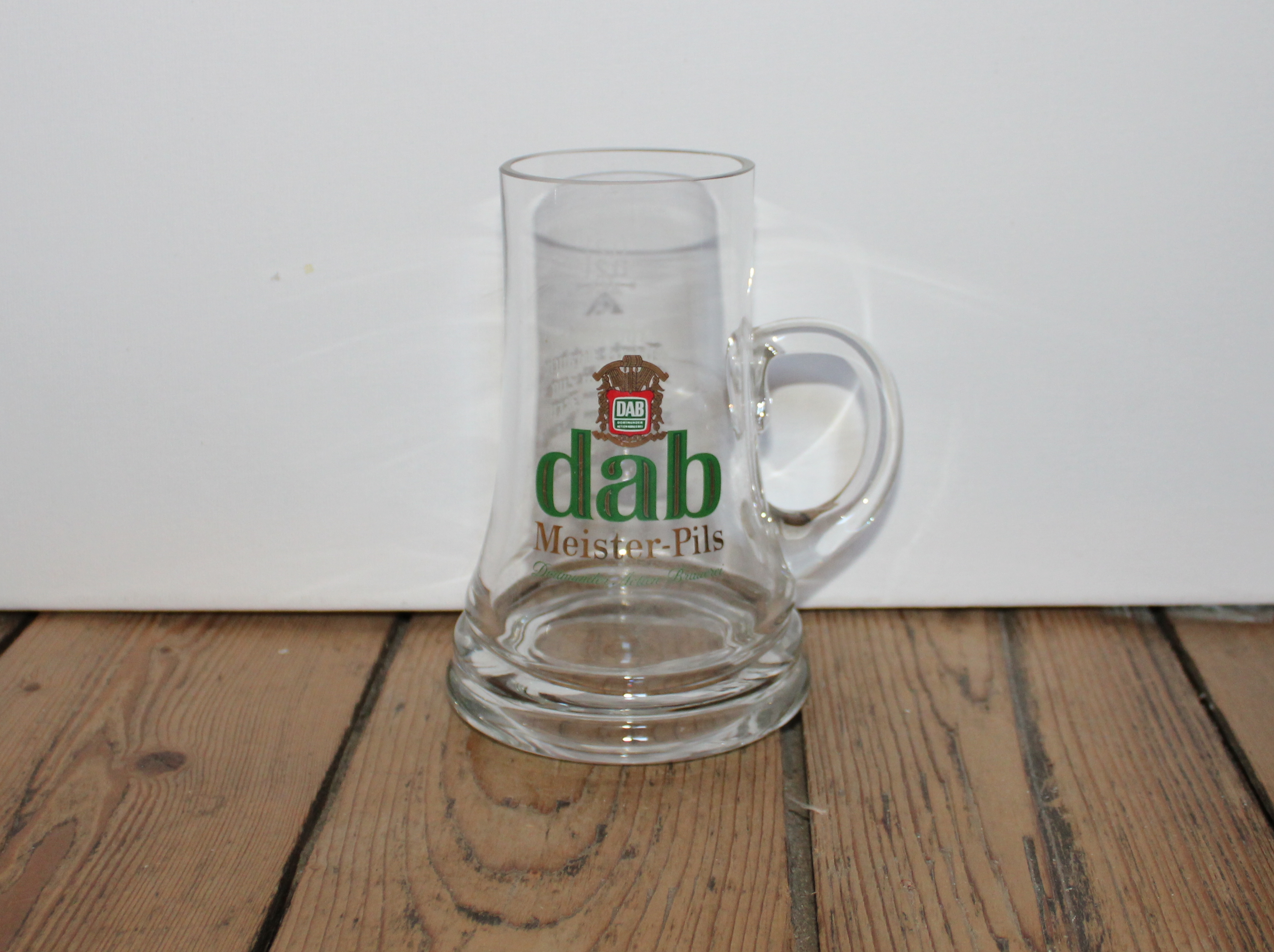 Verre à bière Dab Chope 0,2l